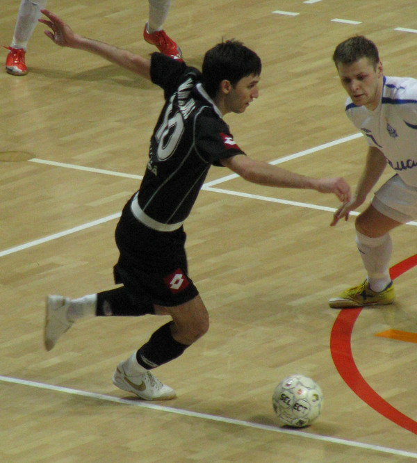 Дамир Хамадиев, игрок МФК "ВИЗ-Синара" и сборной России по мини-футболу